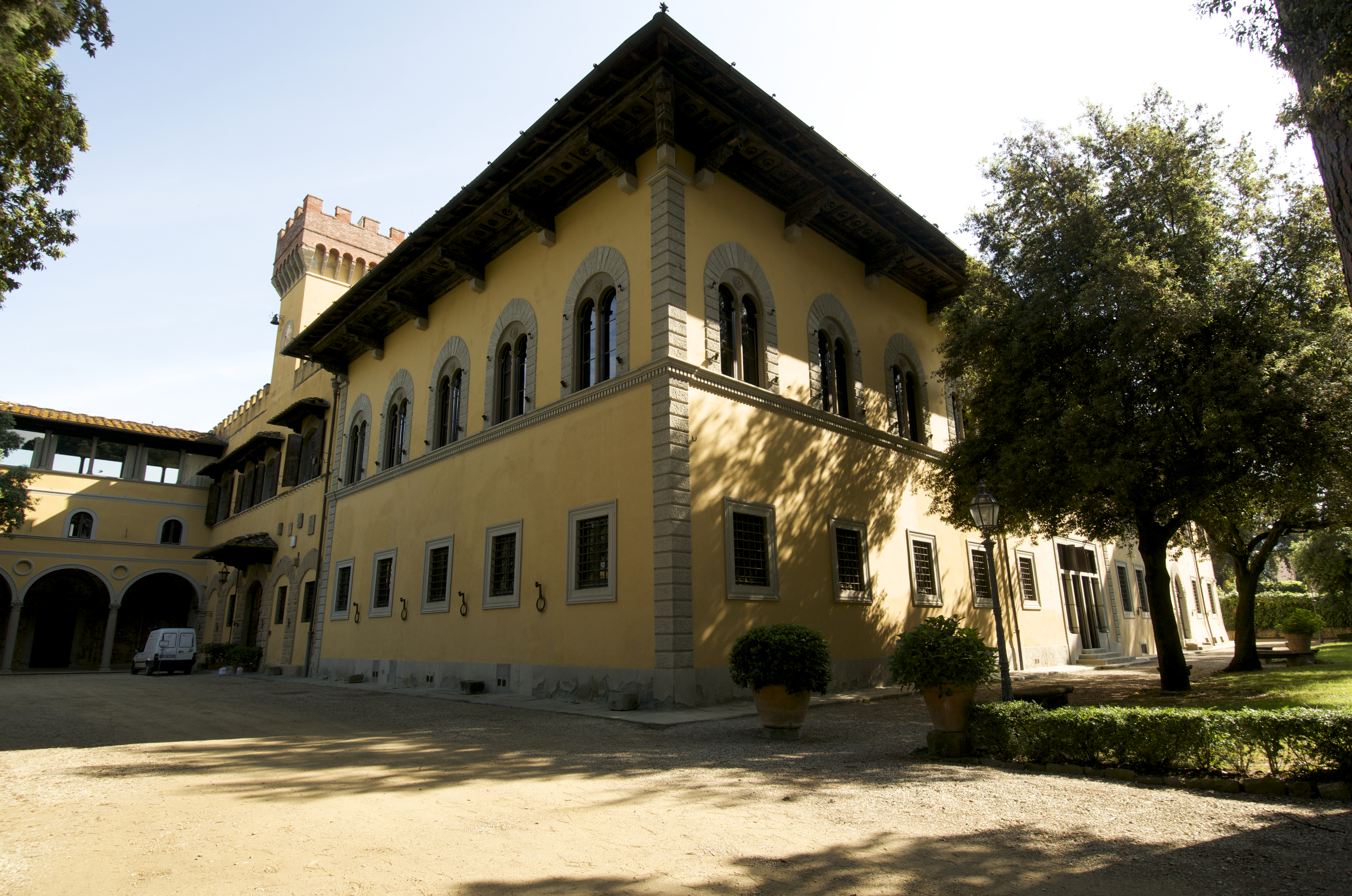 Veduta esterna